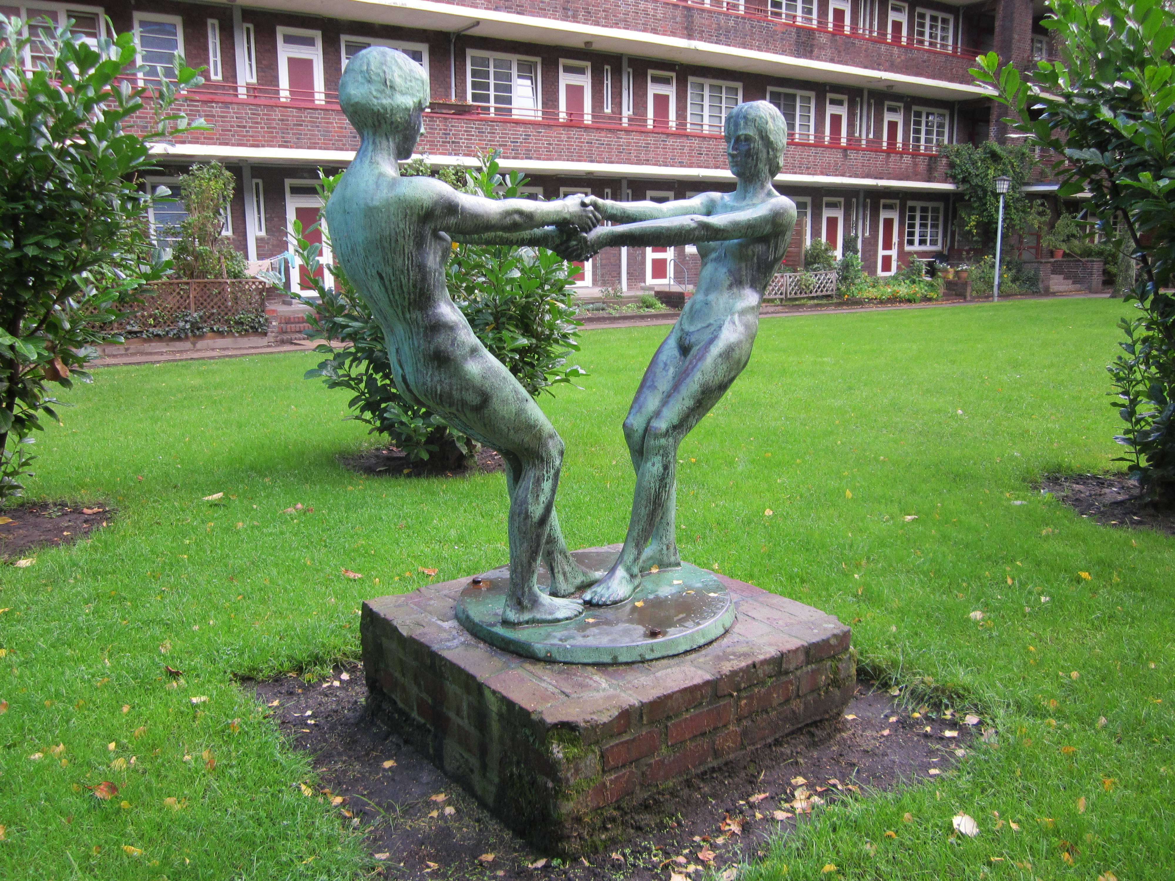 Die Skulptur Ringelreihen von Ludolf Albrecht steht zwischen Häusern in der Mühlhäuser und der Schlettstadter Straße und gehört zum Denkmalensemble der Frankschen Laubenganghäuser auf dem Dulsberg. This is a photograph of an architectural monument.